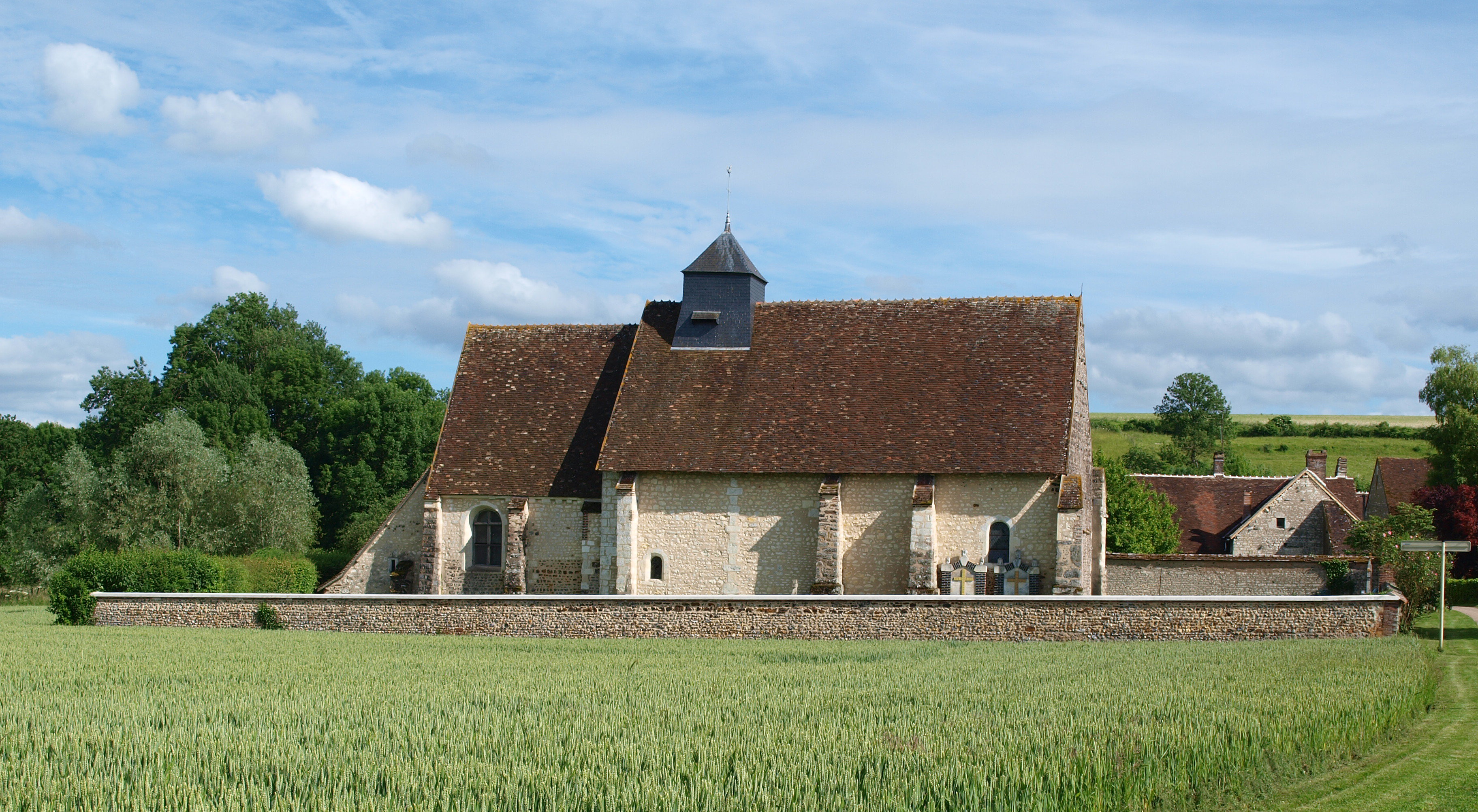 Saint-Martin-sur-Ocre (Yonne, France) ; Saint-Martin sensus stricto.